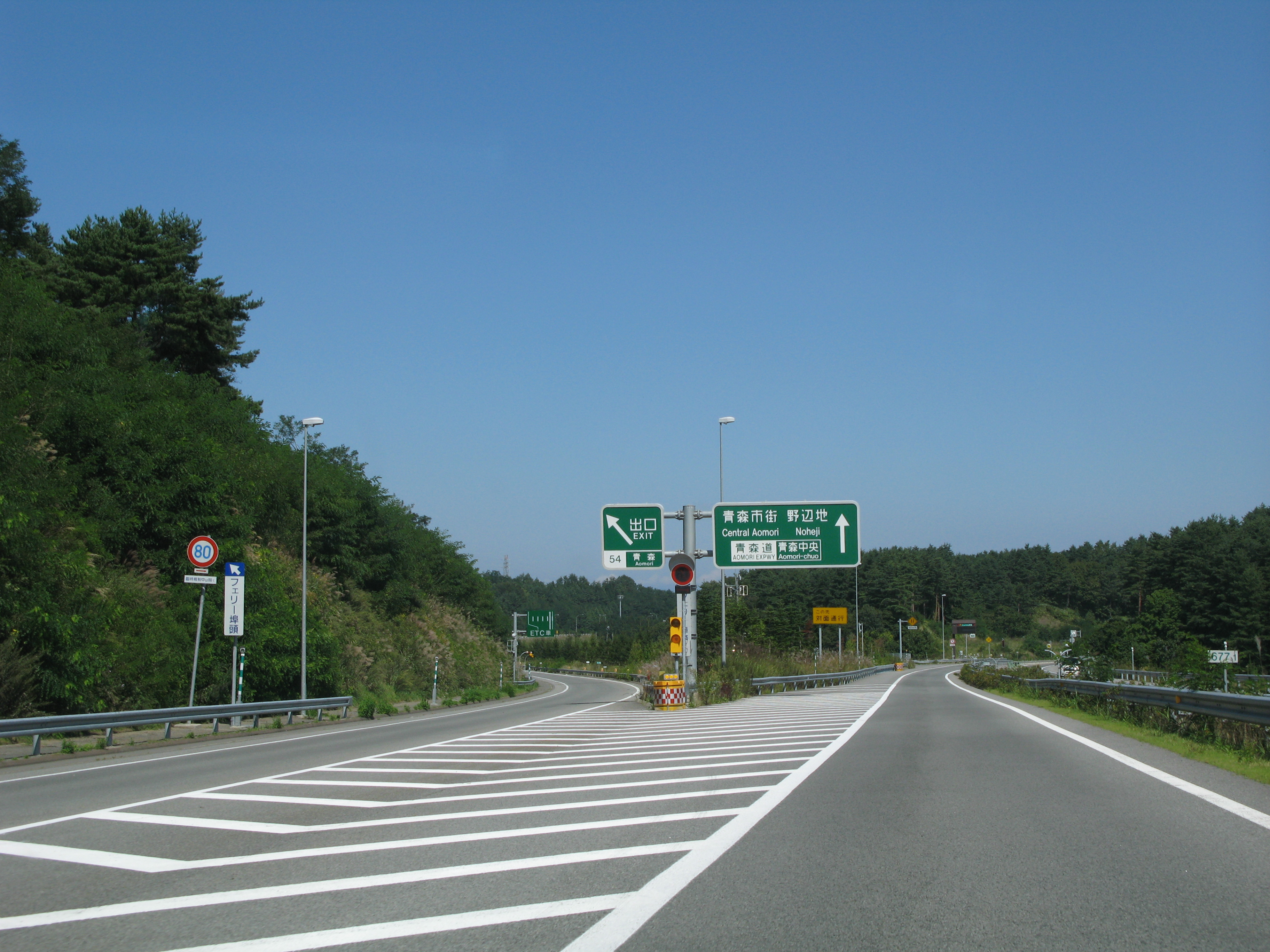 東北自動車道と青森自動車道の分岐